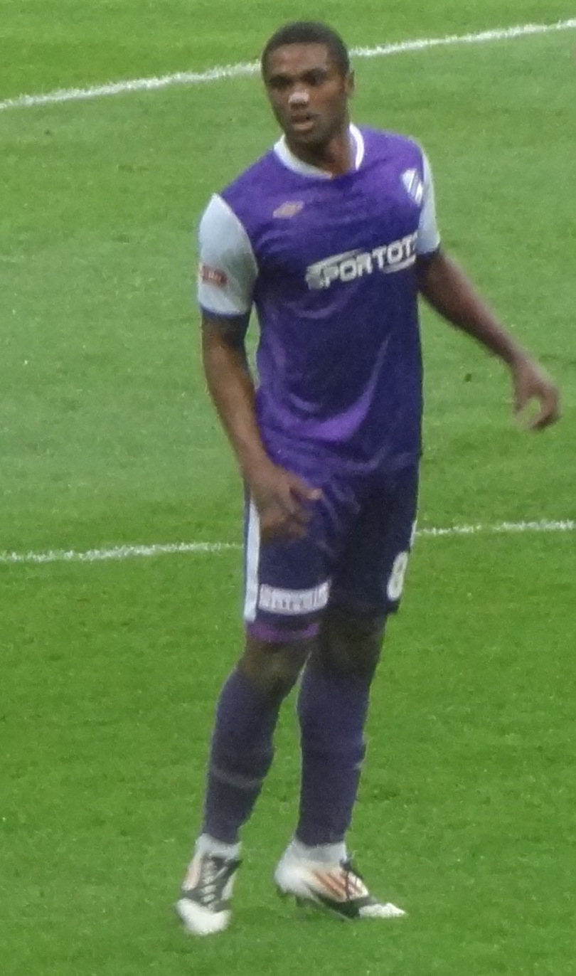 Bruno Galatasaray maçında